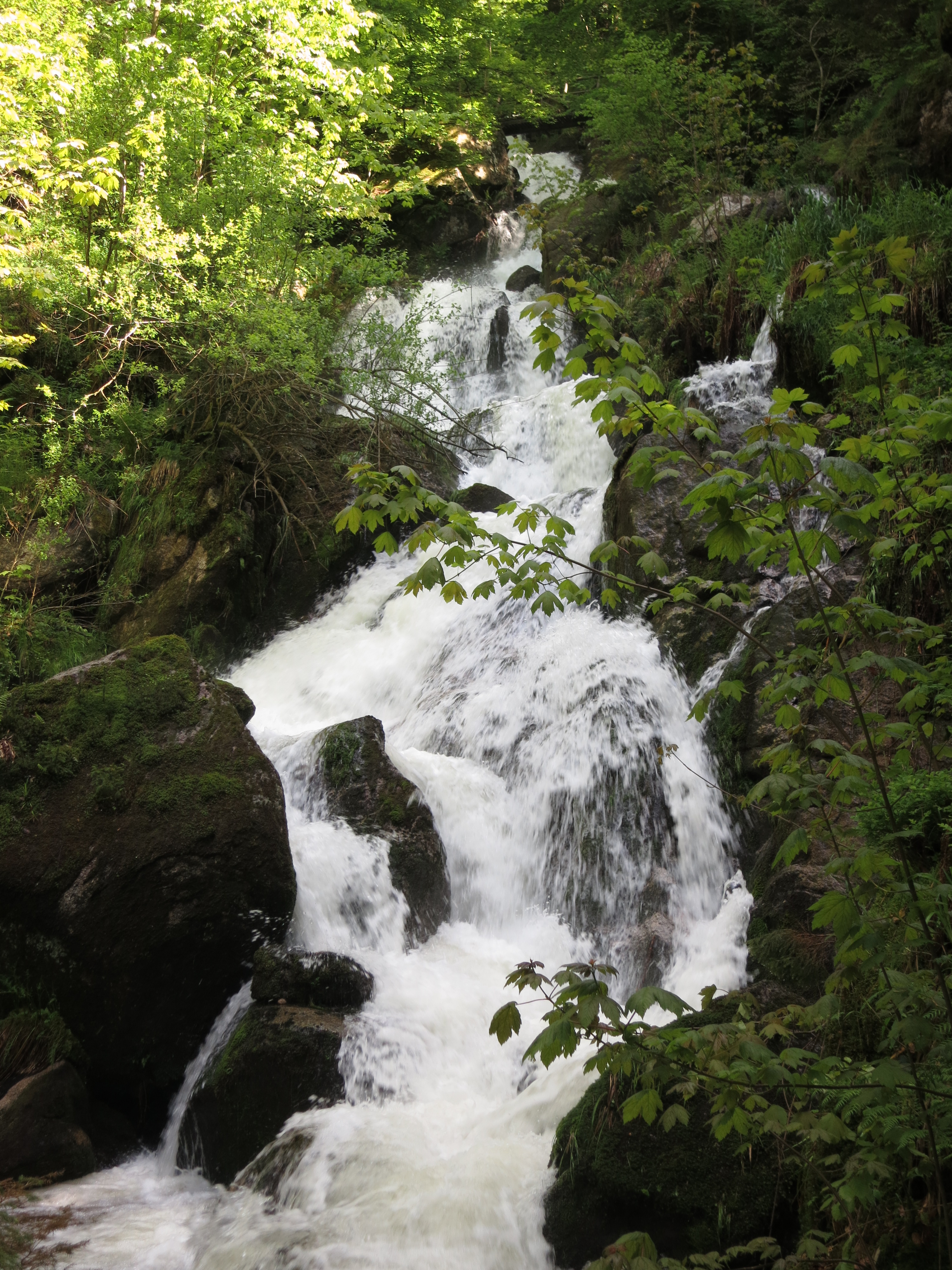 Gertelbach-Wasserfälle bei Bühlertal im Nordschwarzwald.